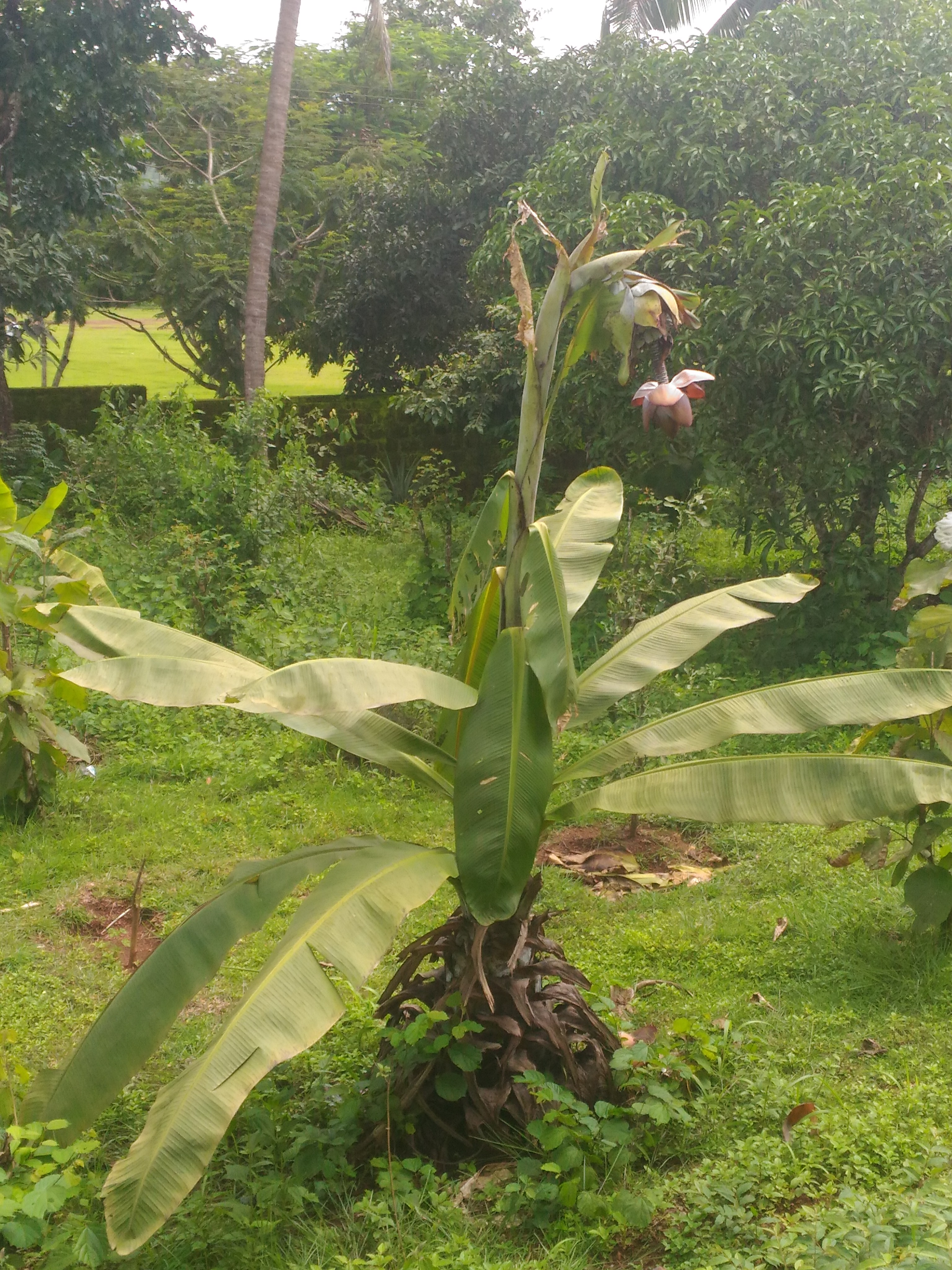 ಕನ್ನಡ: ಪಶ್ಚಿಮ ಘಟ್ಟದ ವಿಶೇಷ ತಳಿ